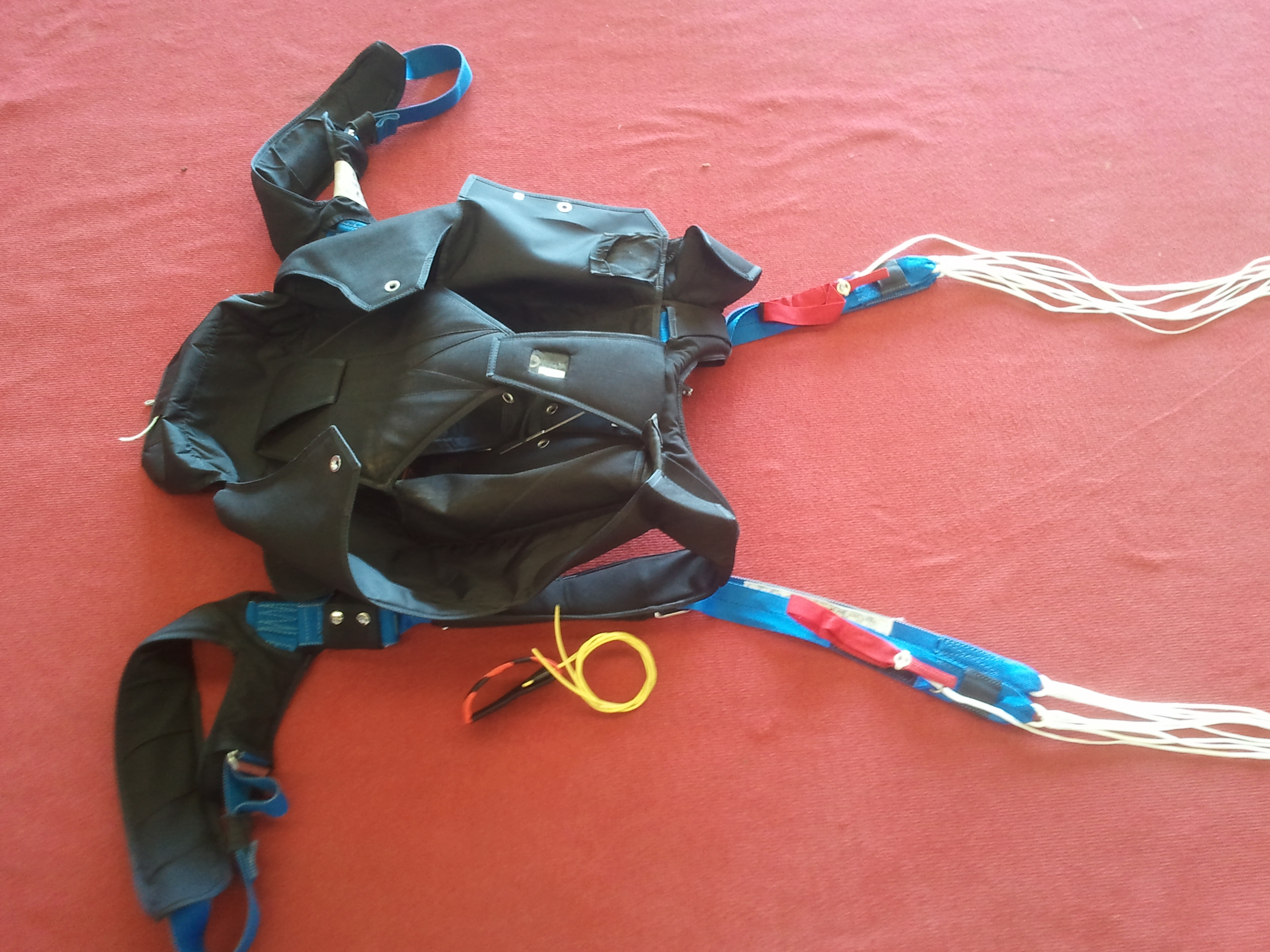 La libération et la première étape de la procédure de secours (PDS). Elle consiste à désolidariser les élévateurs de la voile principale du sac-harnais via le système trois anneaux (voir l'article sur Wikipédia). Le sac harnais avec les élévateurs de la voile de secours en bleu et ses commandes en rouge. La voile de secours se trouve en haut du sac harnais et la voile principale en bas. La poigné rouge et noir avec le jong en jaune c'est la poigné de libération qui sépare la voile principale. Le seul élément qui manque c'est la poigné d'ouverture du secours qui est tombé on ne sait où. La PDS voulant que l'on la lâche après avoir tiré dessus.